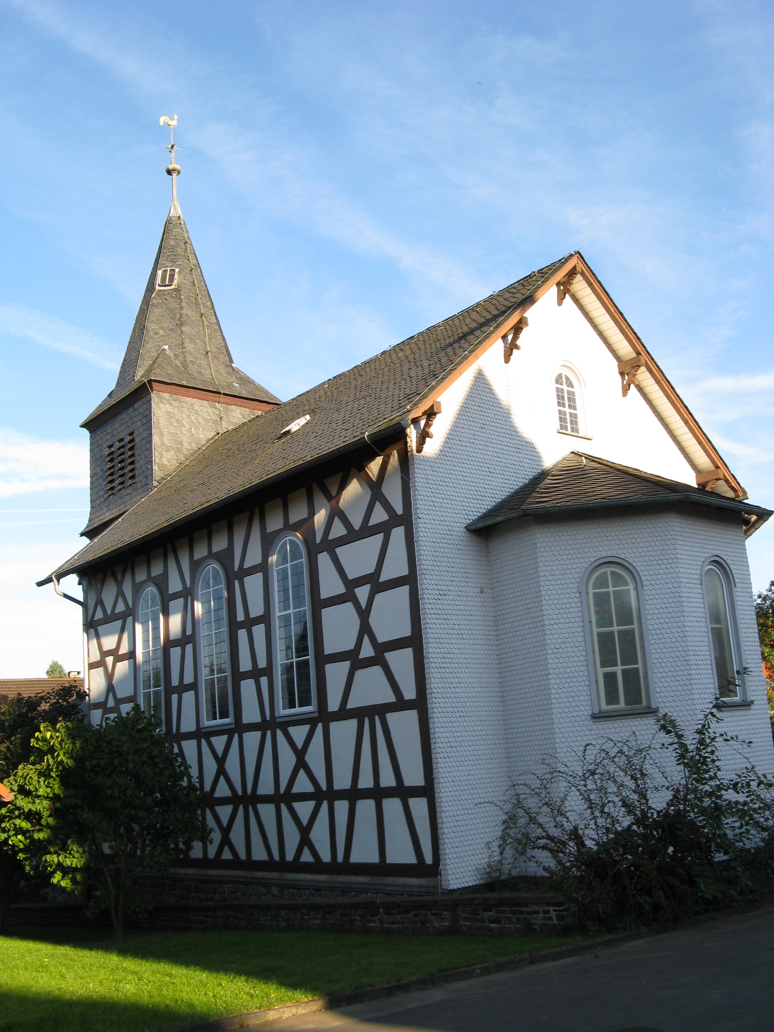 Protestant Church of Ober-Seibertenrod, Vogelsberg/Germany